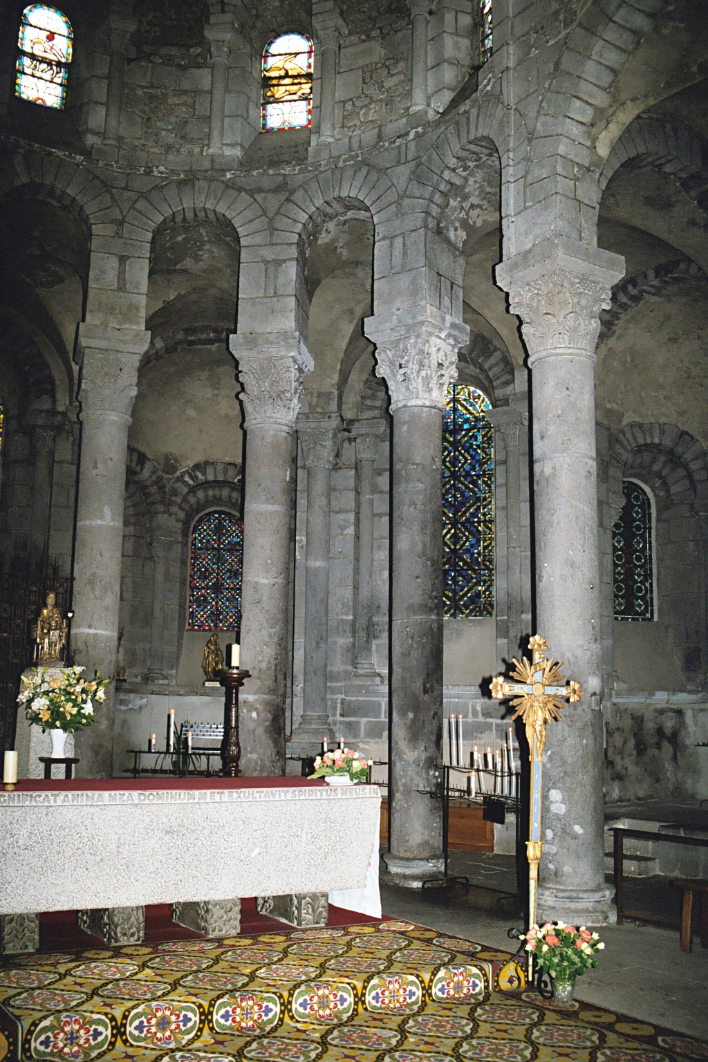 France - Auvergne - Puy-de-Dôme - Basilique Notre-Dame d'Orcival